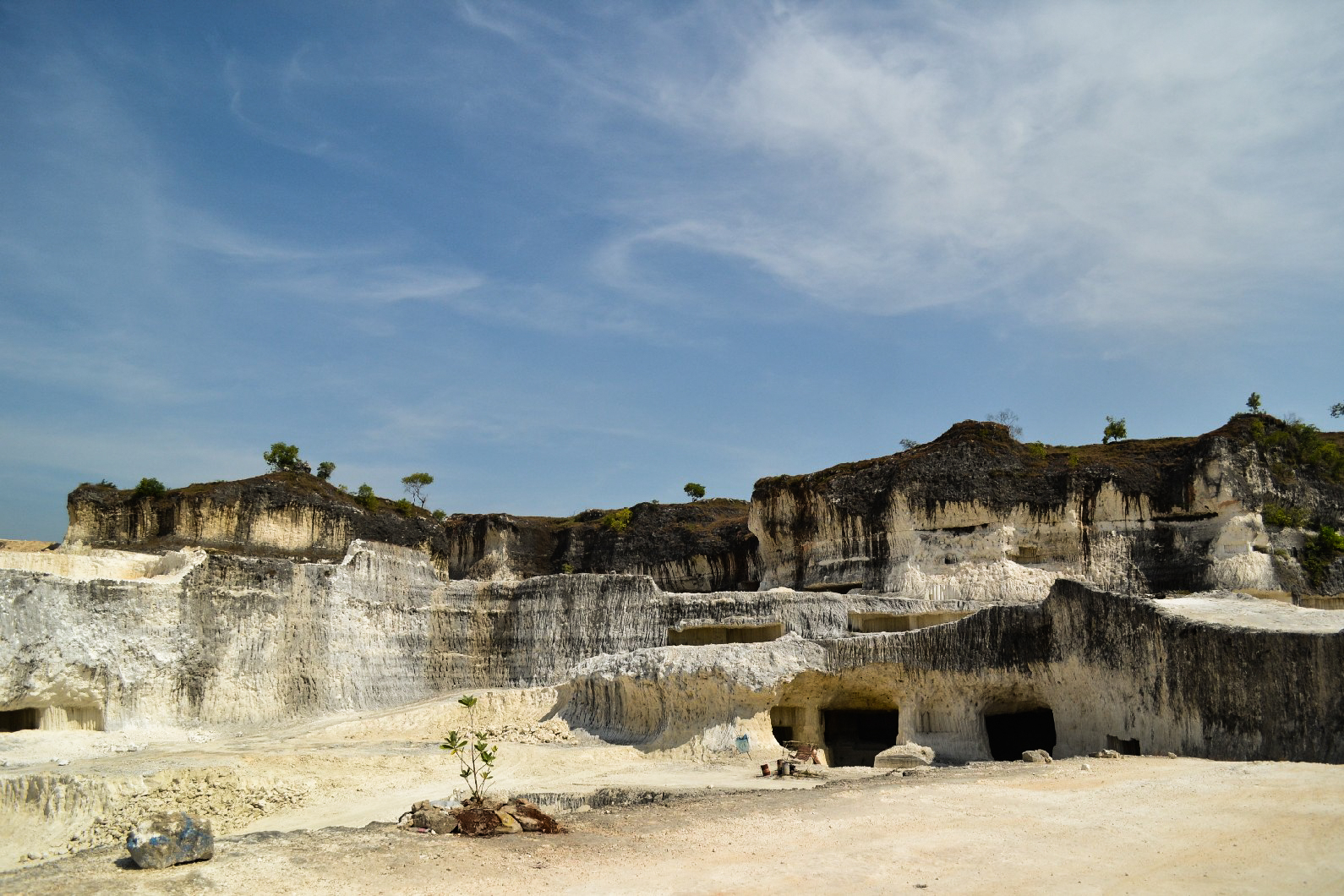 Foto ini merupakan foto Bukit Jaddih. Bukit ini ini merupakan tambang kapur yang terletak di Kecamatan Socah, Desa Jaddih Kabupaten Bangkalan Madura, Jawa Timur. Keunikan tempat ini adalah bongkahan-bongkahan kapur yang sangat menarik dan eksotis, ditambah lagi bukit Jaddih mirip dengan gurun pasir sehingga tempat ini selalu memikat wisatawan. hasil perhatian dan tempat ini